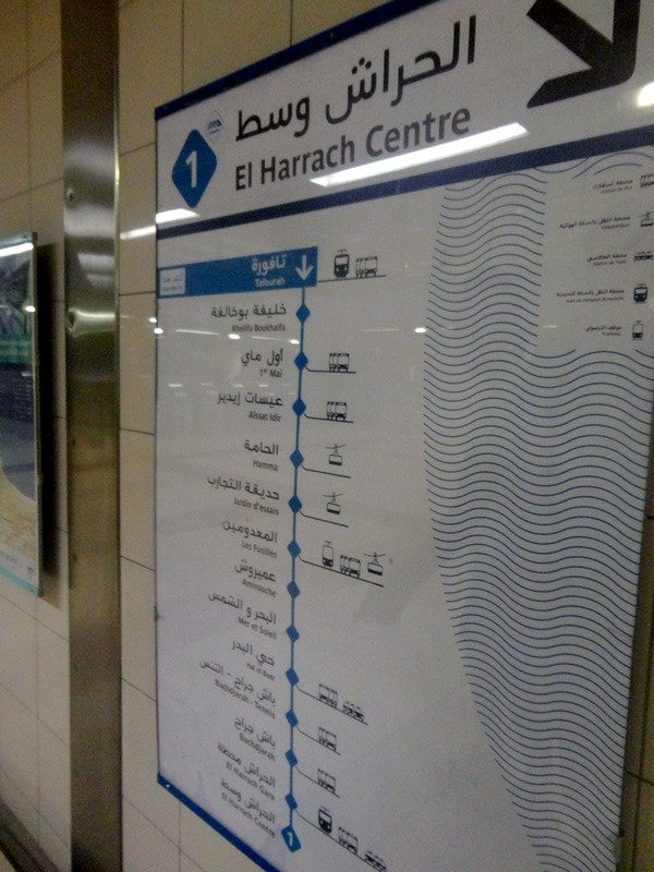 Plan du Metro d'Alger, station El Harrach Centre